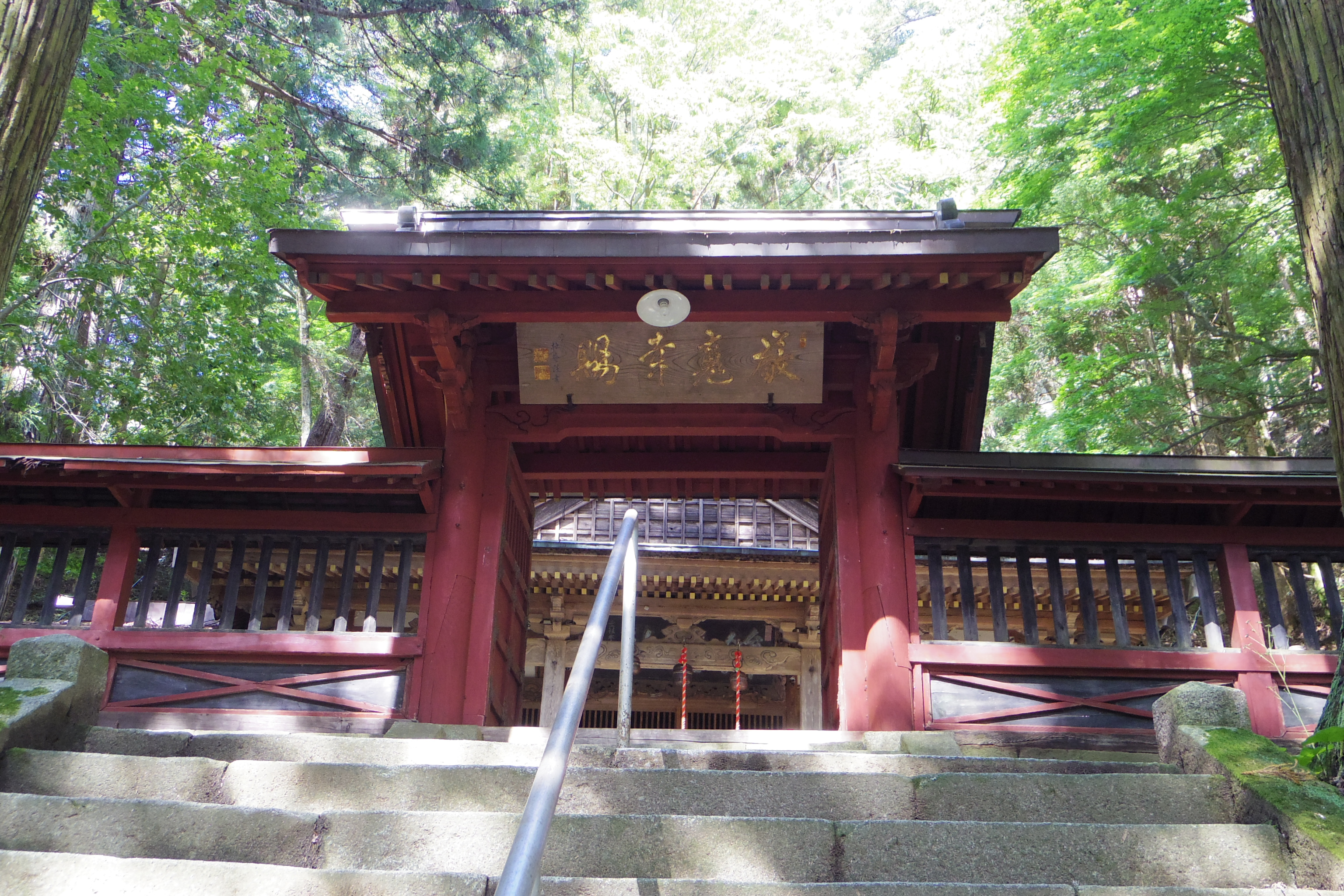 鉾持神社門